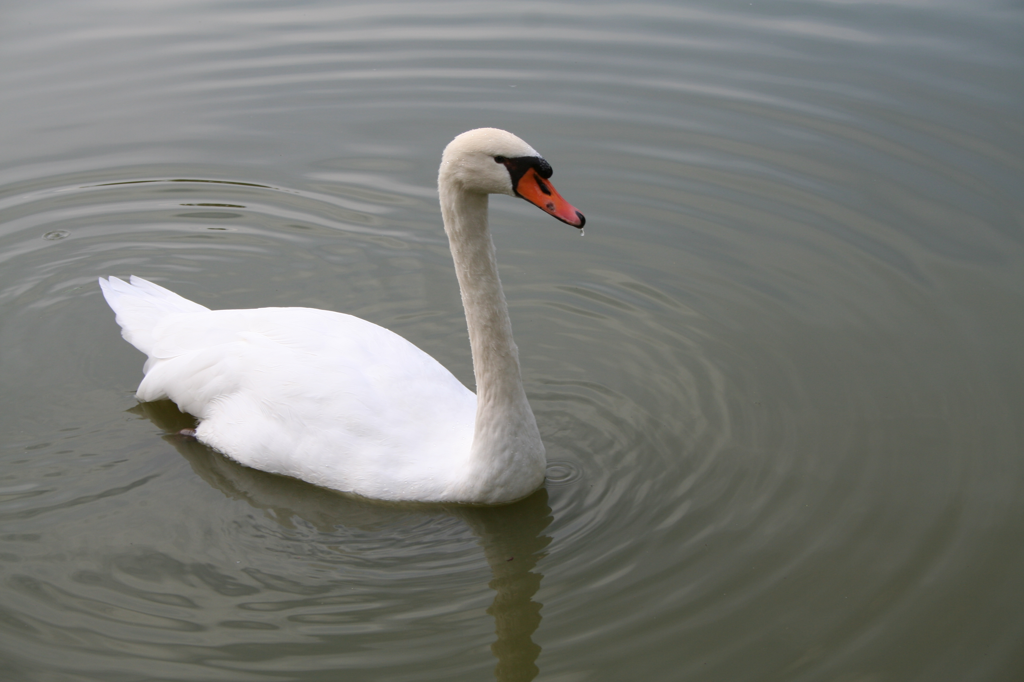 Bois de Vincennes, Paris, France.